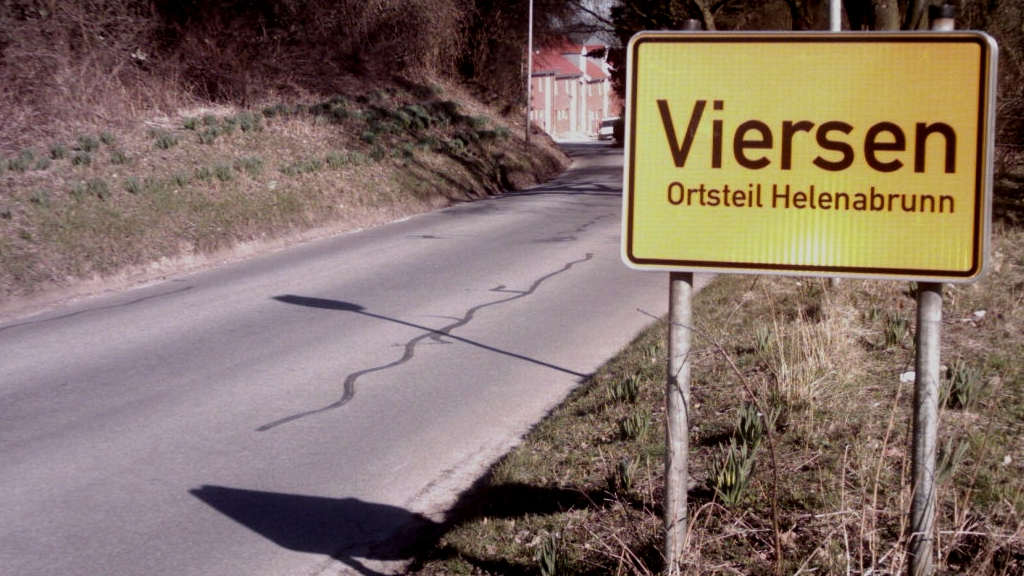 Kombord van Viersen-Helenabrunn.